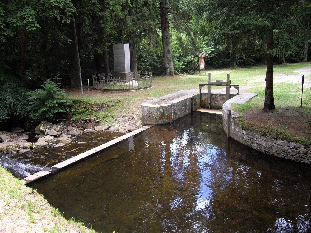 L'Alzeau et la prise d'eau alimentant la rigole de la montagne (Lacombe, Aude, France).